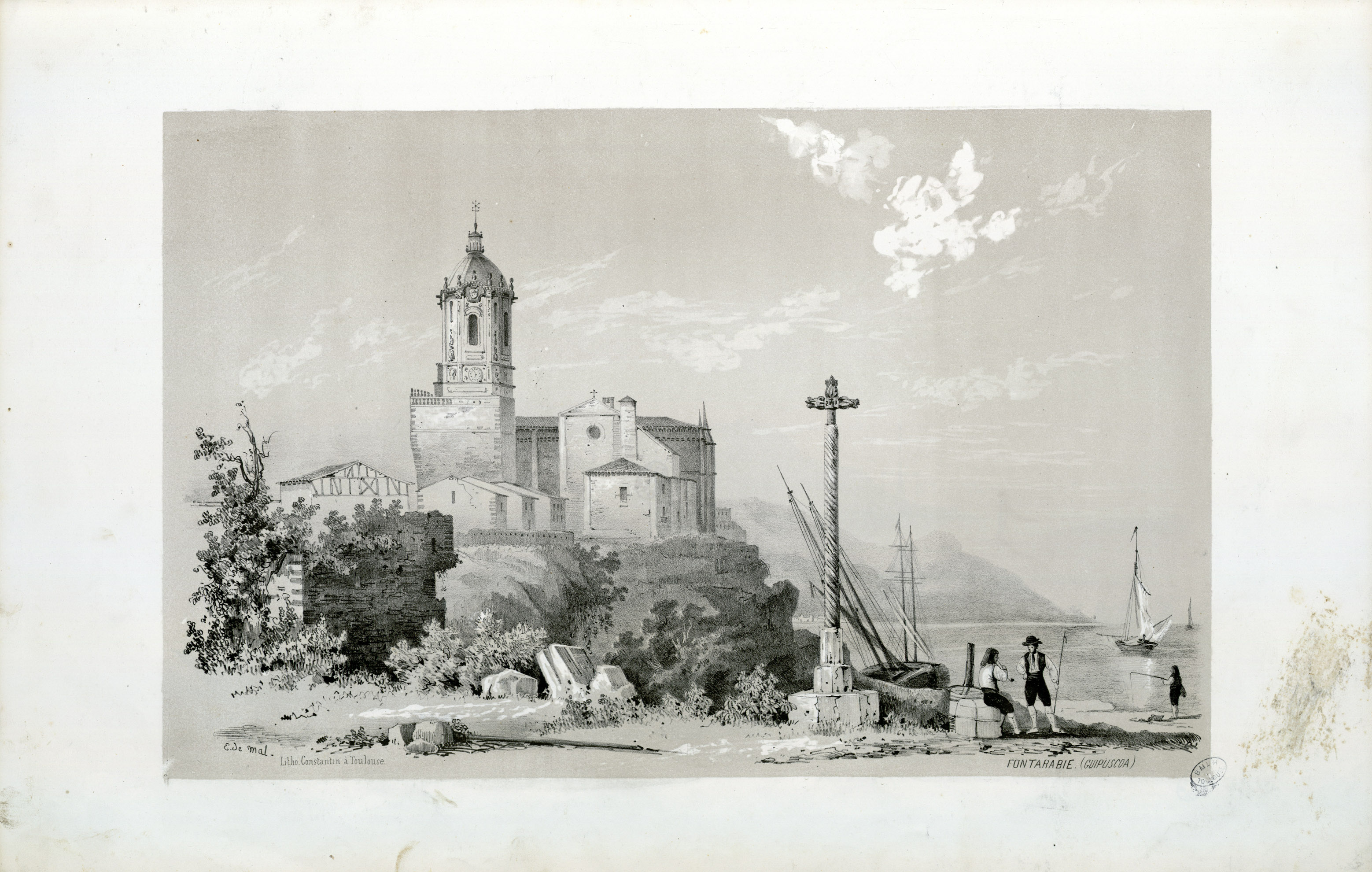 Fait partie d'un recueil de 15 planches lithographiées en camaïeu avec titre lithographié Ancely, René (1876 - 1966). Possesseur